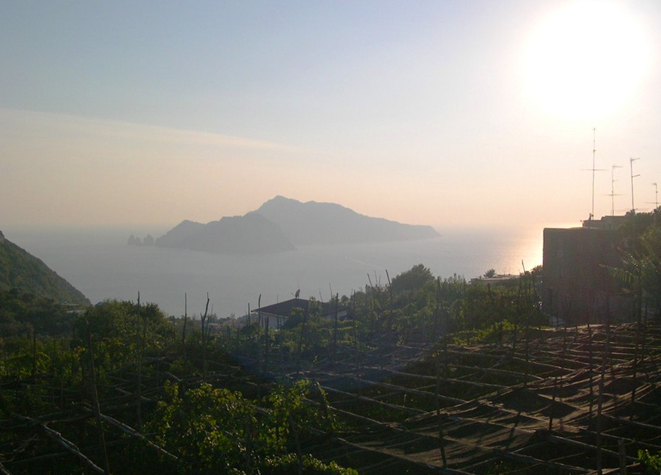 Isla de Capri al atardecer, desde la punta de la peninsula de Sorrento, Campania (Italia)